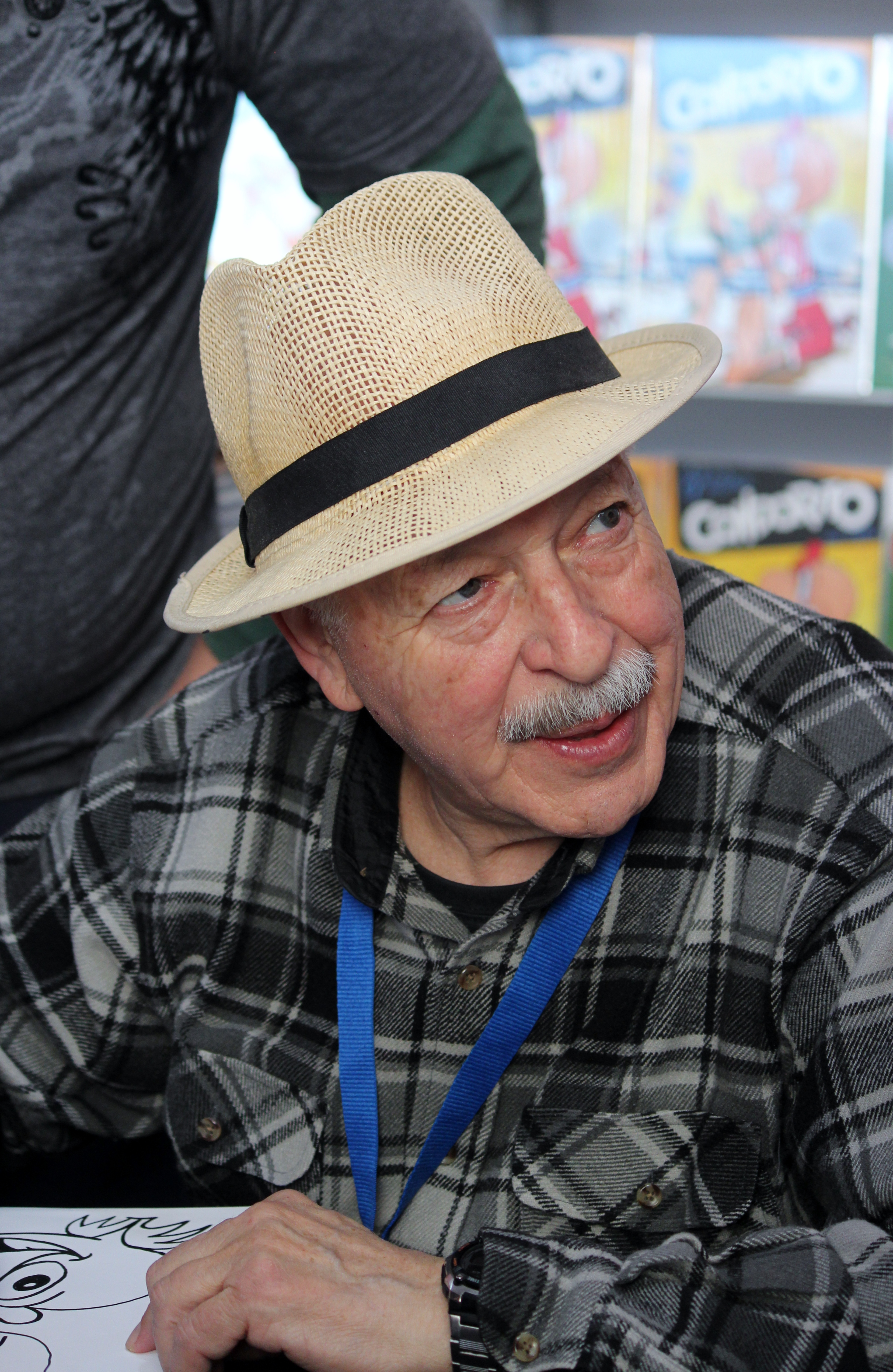 Miguel Ortiz, el último del primer equipo de dibujantes de Condorito que dirigía Pepo, autografía sus dibujos en la Feria Internacional del Libro de Santiago 2018.